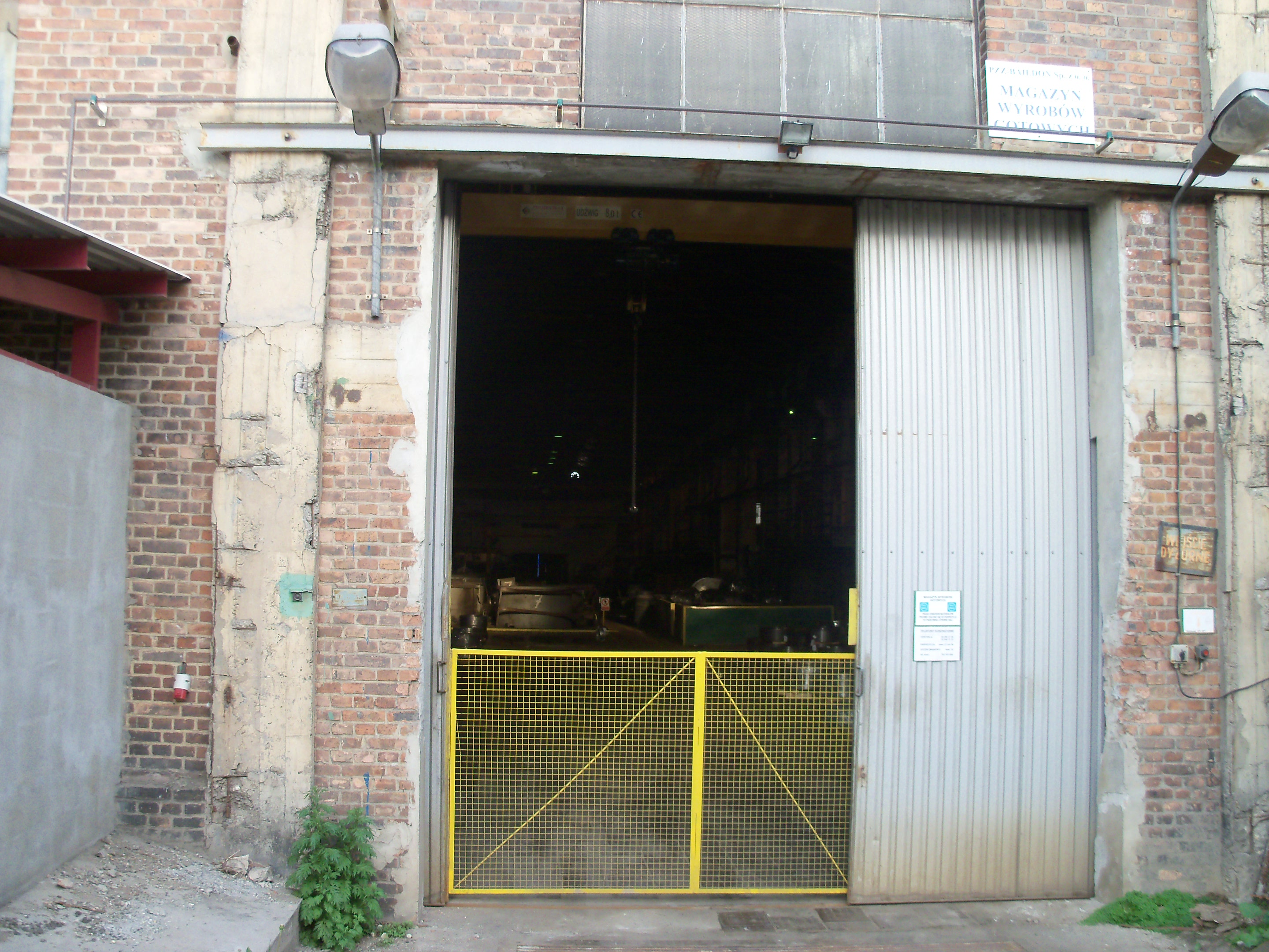 Huta Baildon w Katowicach